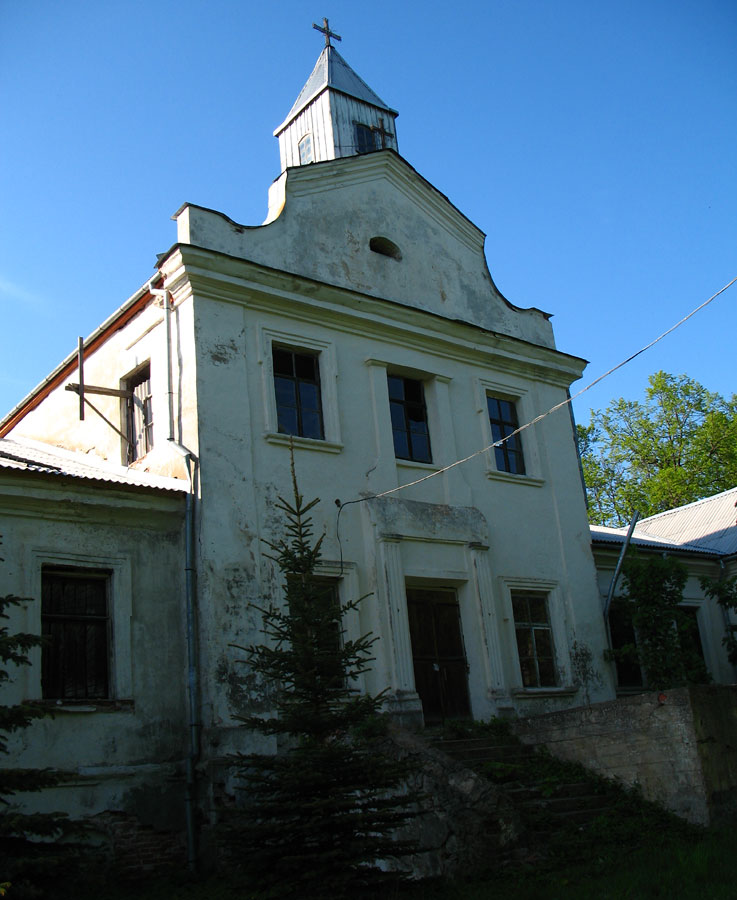 Lapacinski Estate in Liavonpaĺ